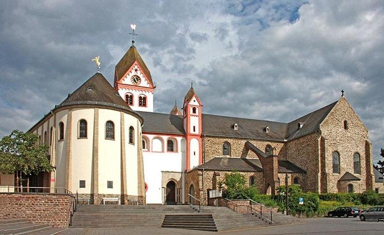 Medarduskirche in Bendorf, Landkreis Mayen-Koblenz